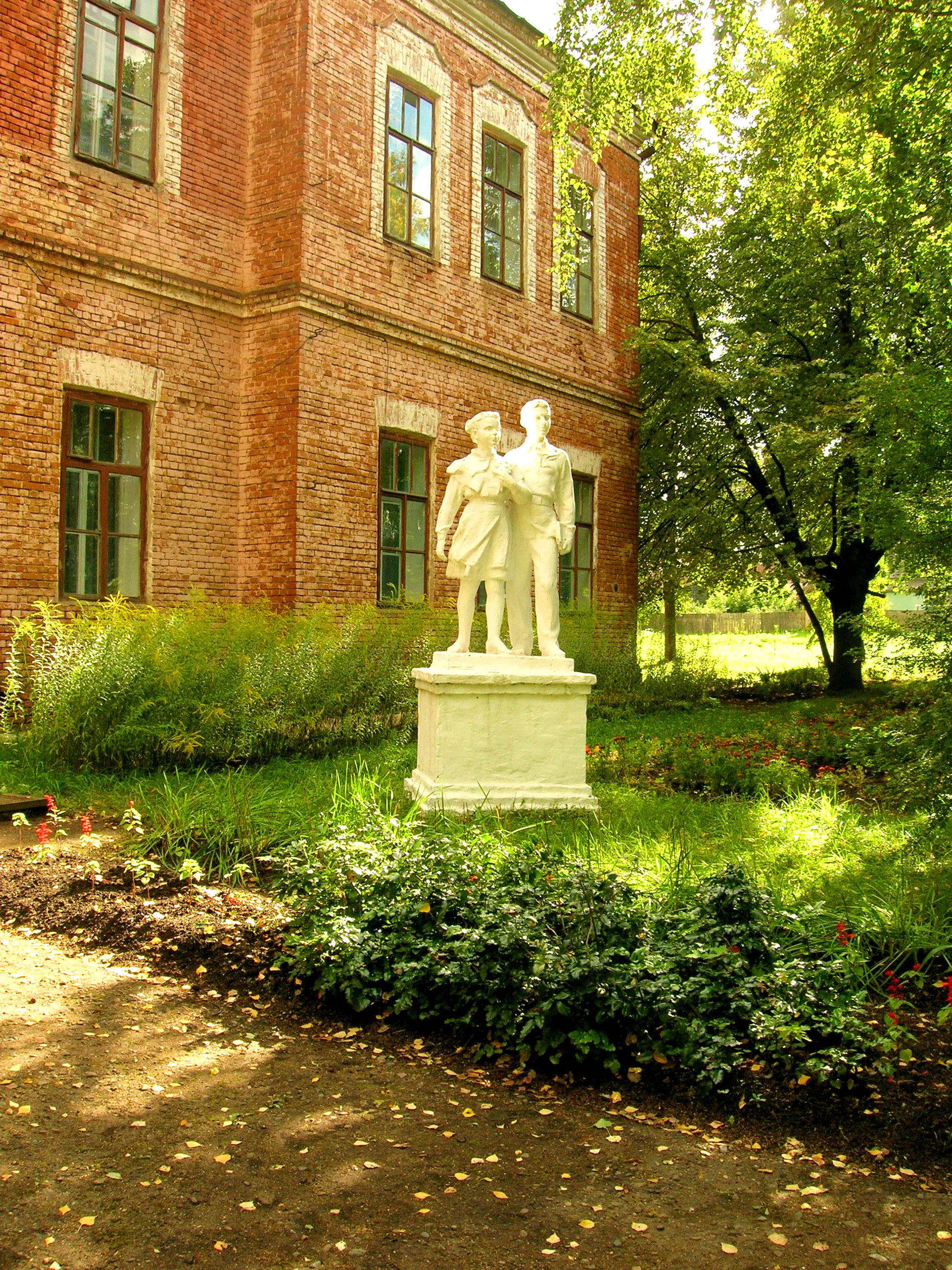 В солнце